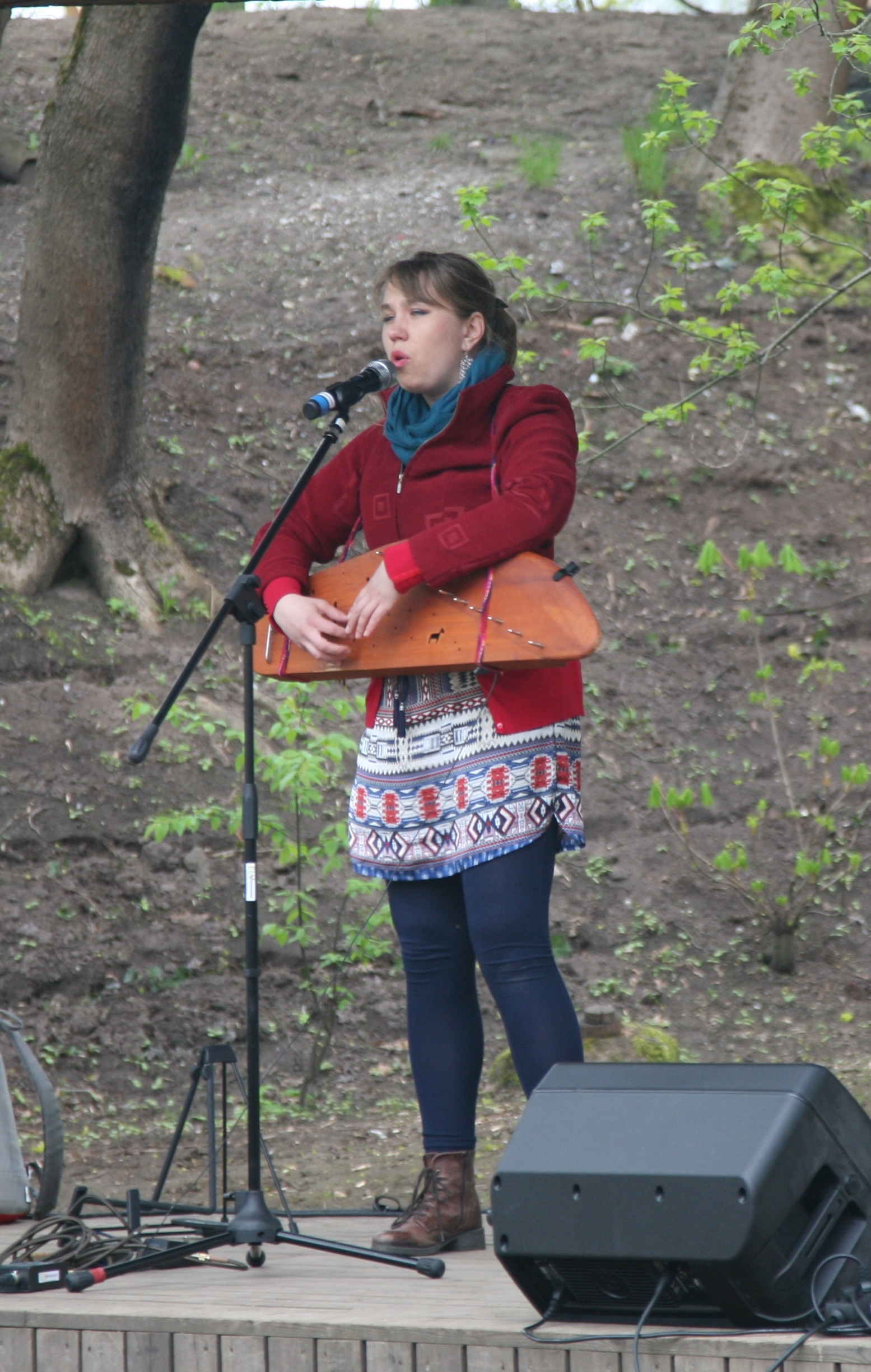 Mari Kalkun Prima Vista 2015 avamisel